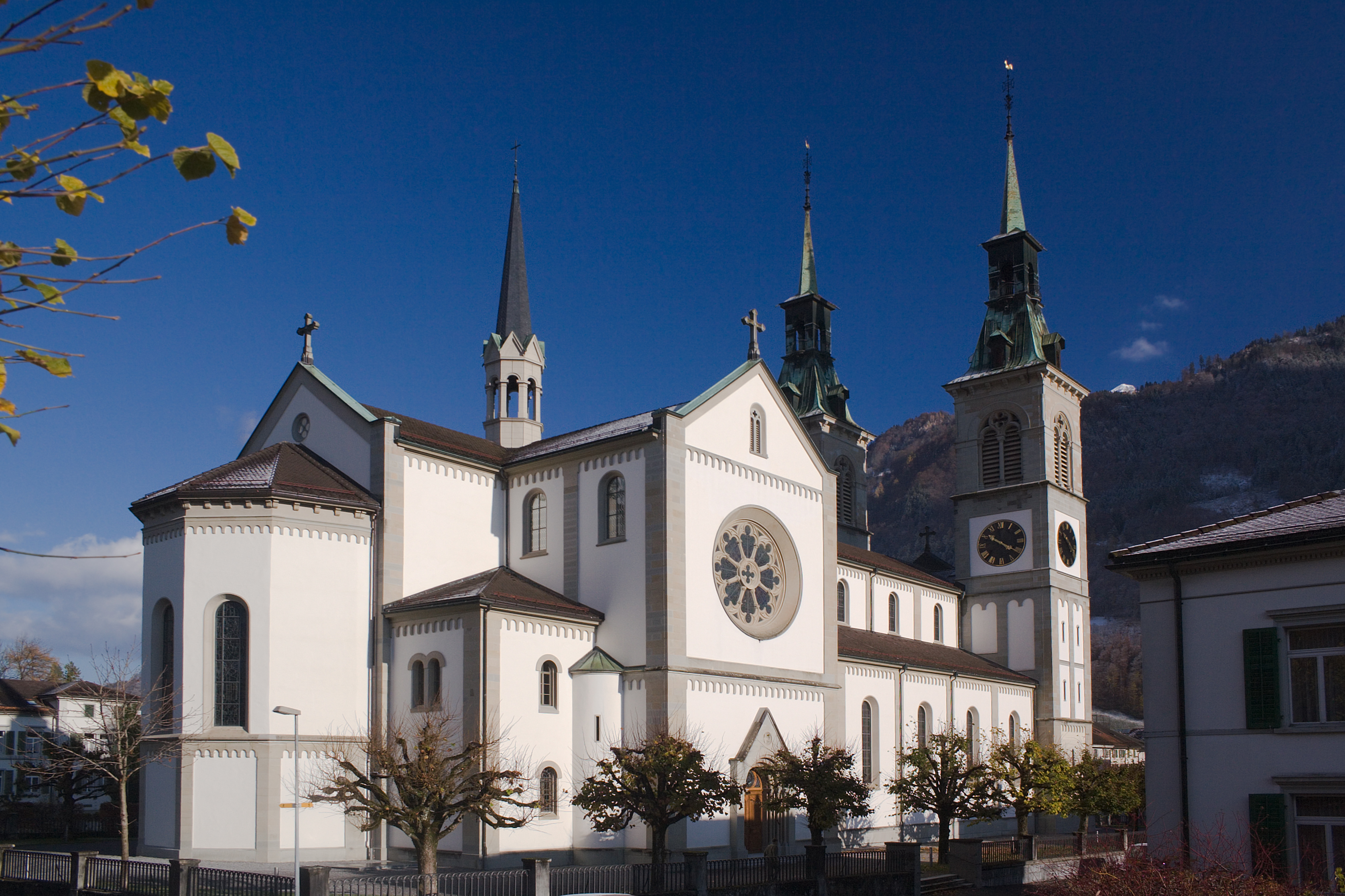 Stadtkirche Glarus, SchweizEin Bau von Ferdinand Stadler